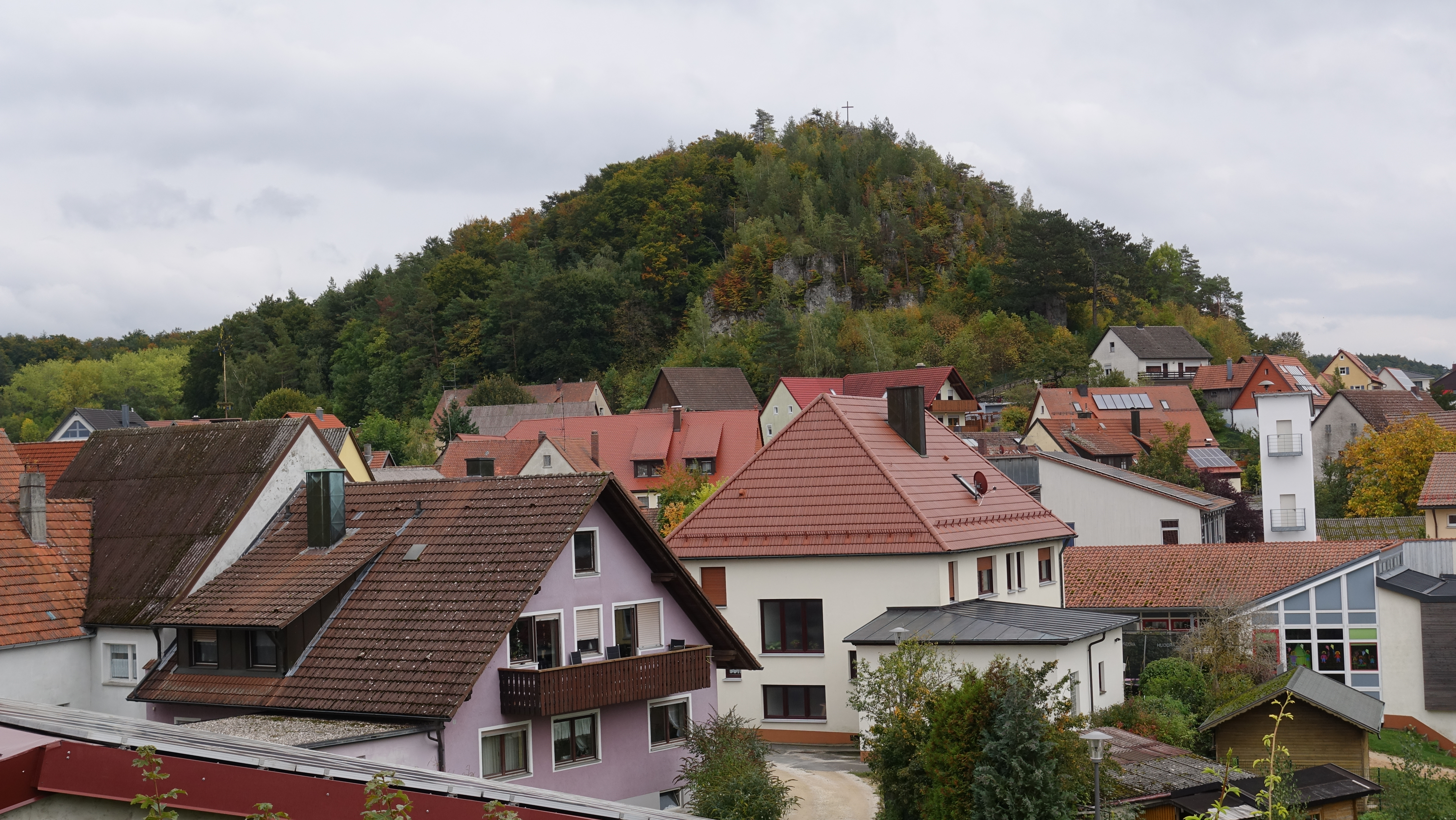 Neuhaus - Okt. 2019 - Hartenstein - Hirtenberg